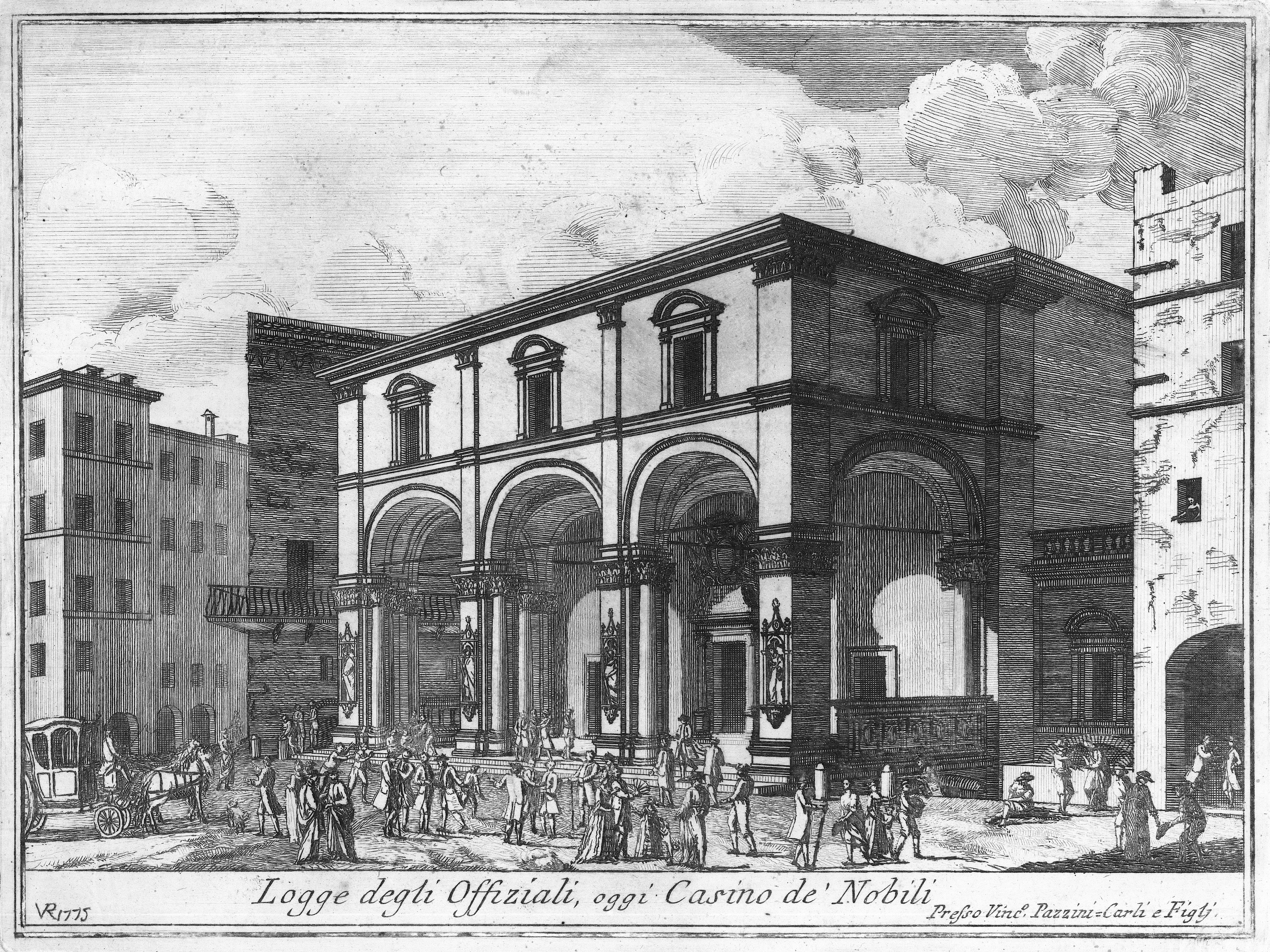 Stampa del Pazzini Carli, raffigurante le Logge della Mercanzia, oggi del Circolo degli Uniti (già Casin de' Nobili)